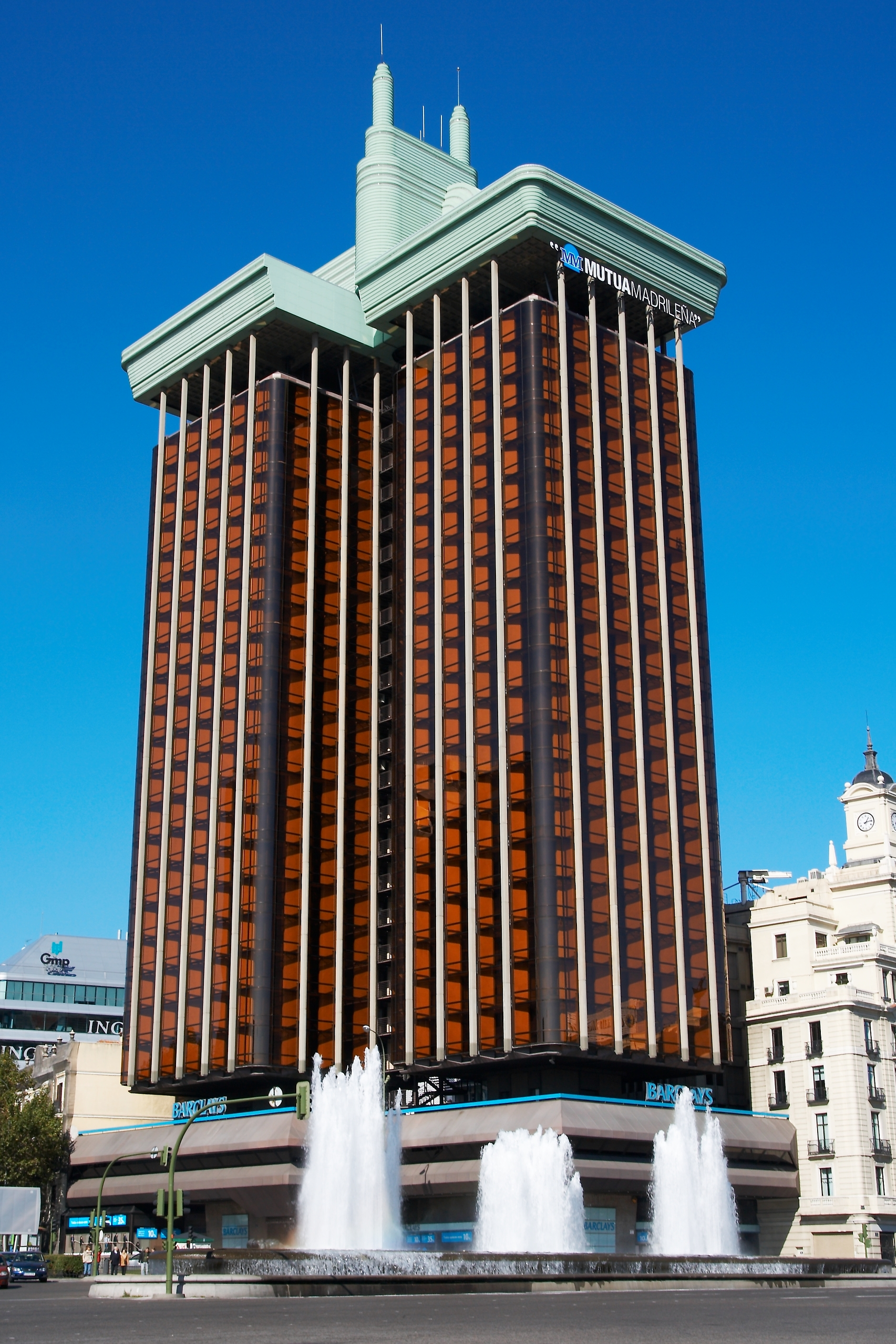 Torres de Colón, Madrid.